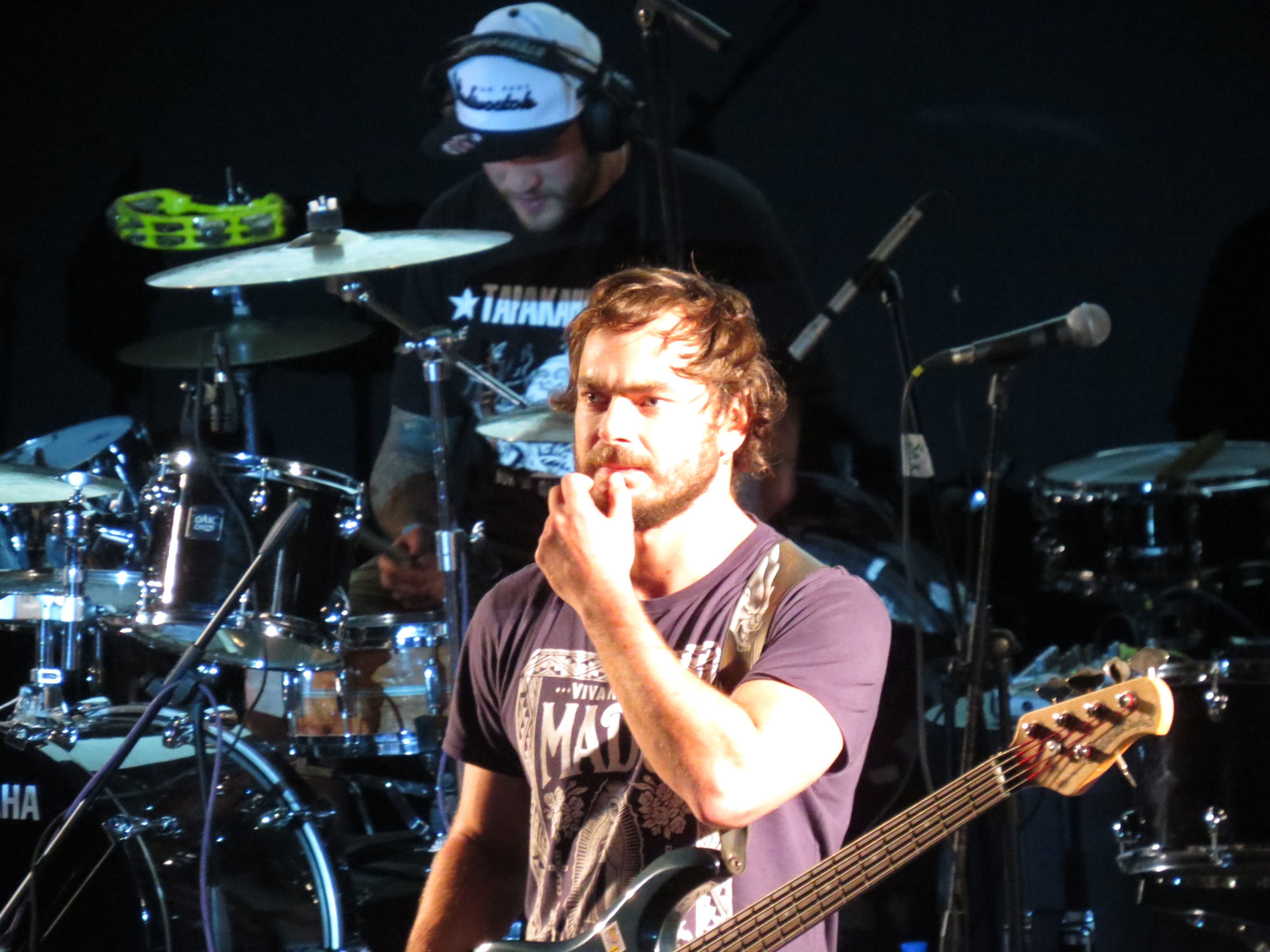 Благотворительный концерт «#РокУзник» в поддержку «узников 6 мая» в ТКЗ «Мир» 22 сентября 2013 года.